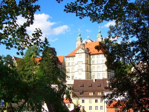 Malteserkirche und neues Stadtmuseum